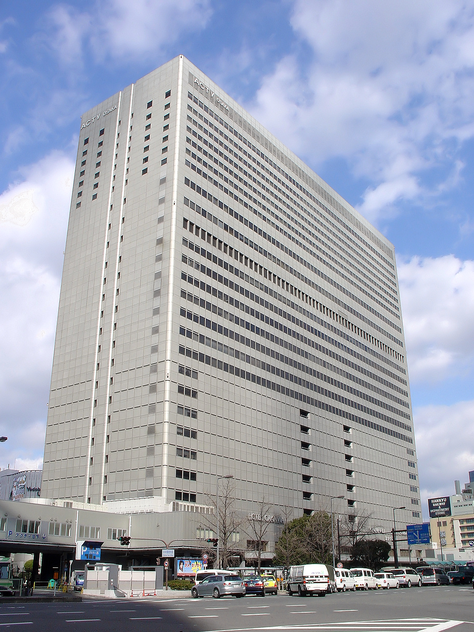 Osaka Terminal Building.(Kita Ward, Osaka City, Osaka Prefecture, Japan)